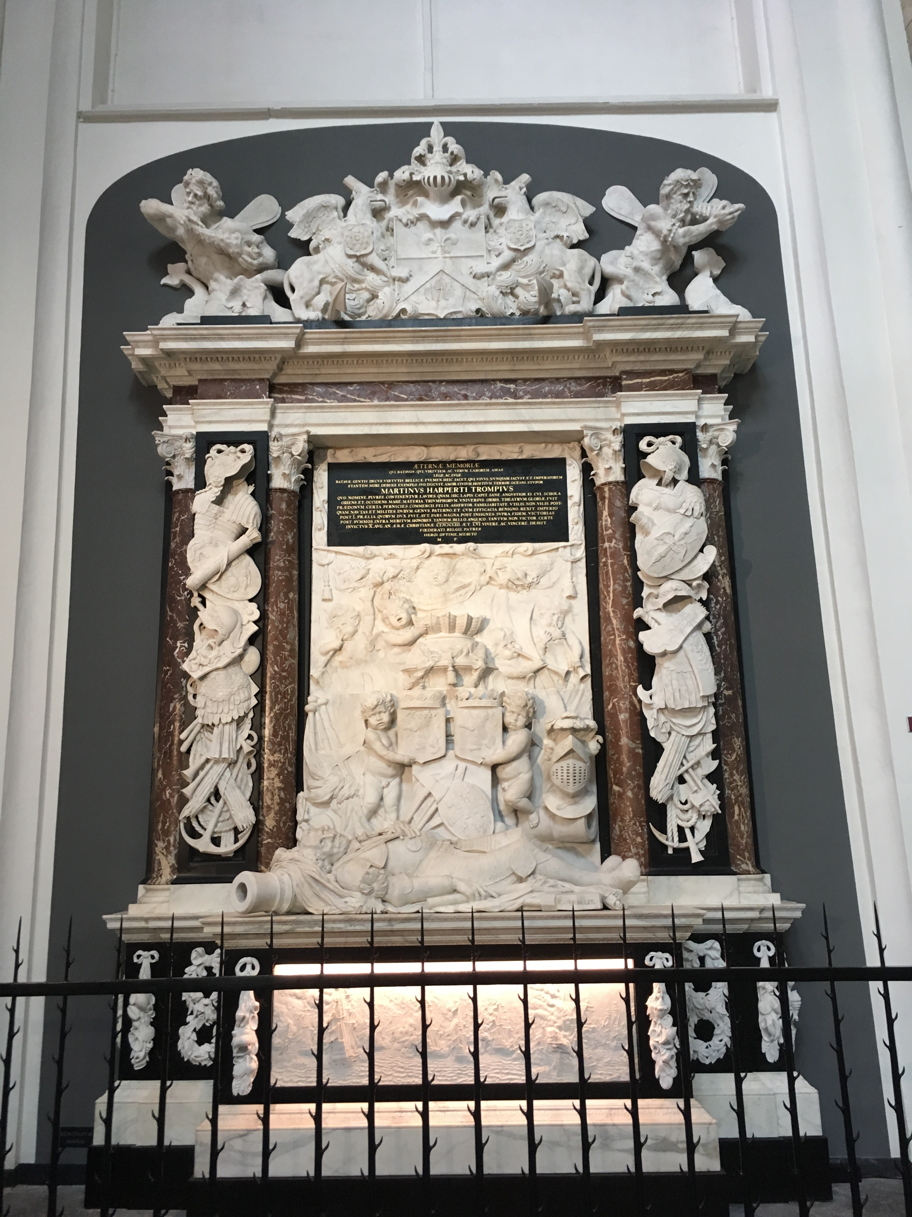 Memorial of Maarten TROMP in Oude Kerk (Delft)